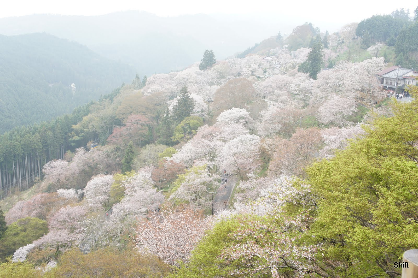 [奈良県] 吉野山(よしのやま)にて。一目千本とも言われる桜の名所です。山の下から、下千本・中千本・上千本・奥千本と別れています。道中には土産物屋も多数。吉野葛が有名。神社仏閣もあり、金峯山寺(きんぷせんじ)の銅の鳥居(かねのとりい)は日本三鳥居のひとつで、奈良の大仏の余りで作ったとも言われるものですが、実際は室町時代に再興したものだとか。